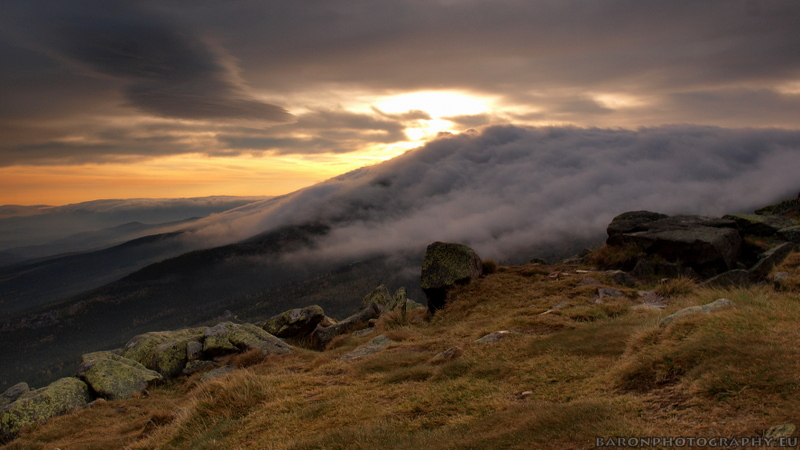 Fen w Karkonoszach widziany ze szczytu Szrenicy